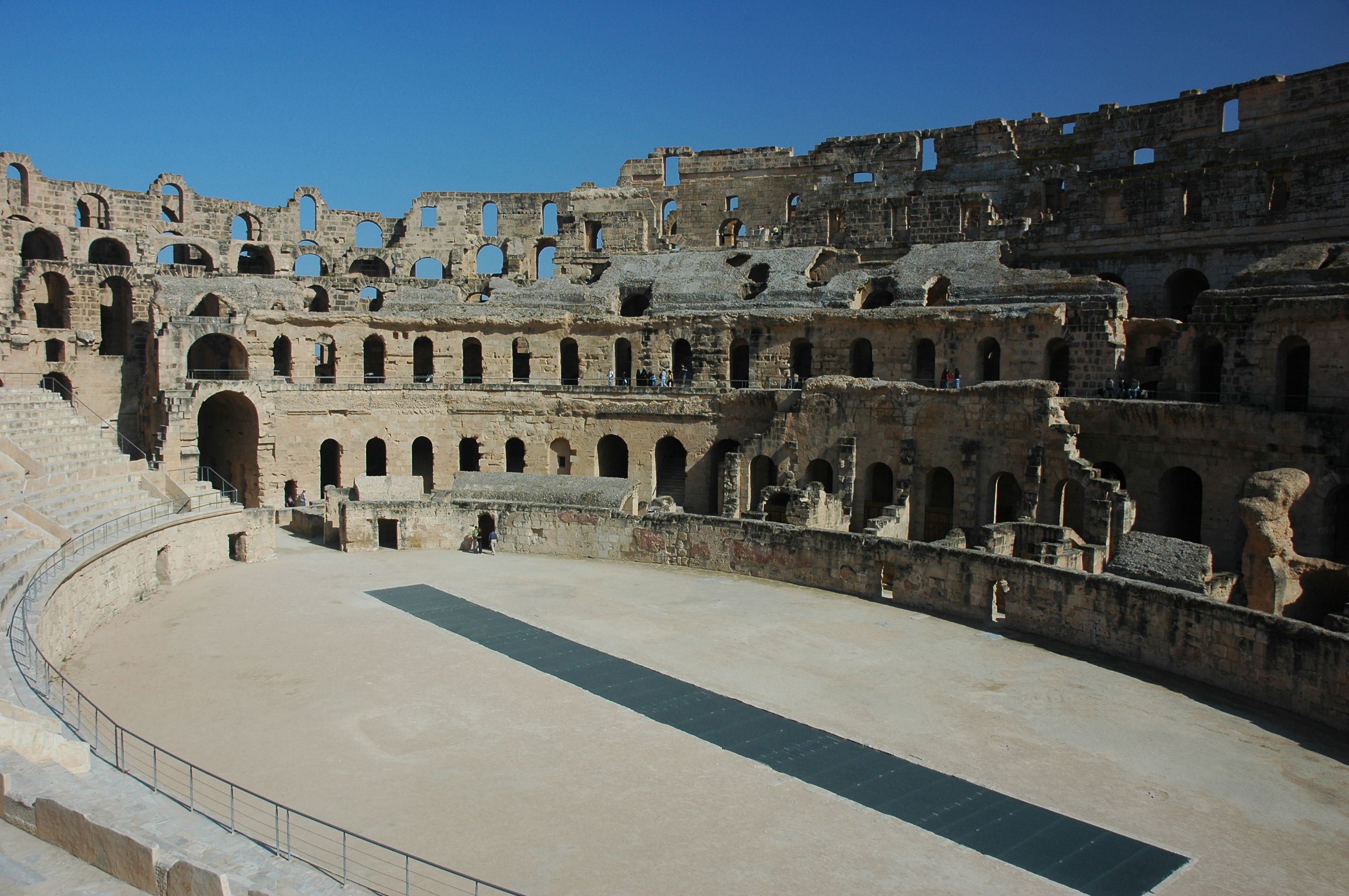 Amphithéatre d'EL'DJEM en Tunisie